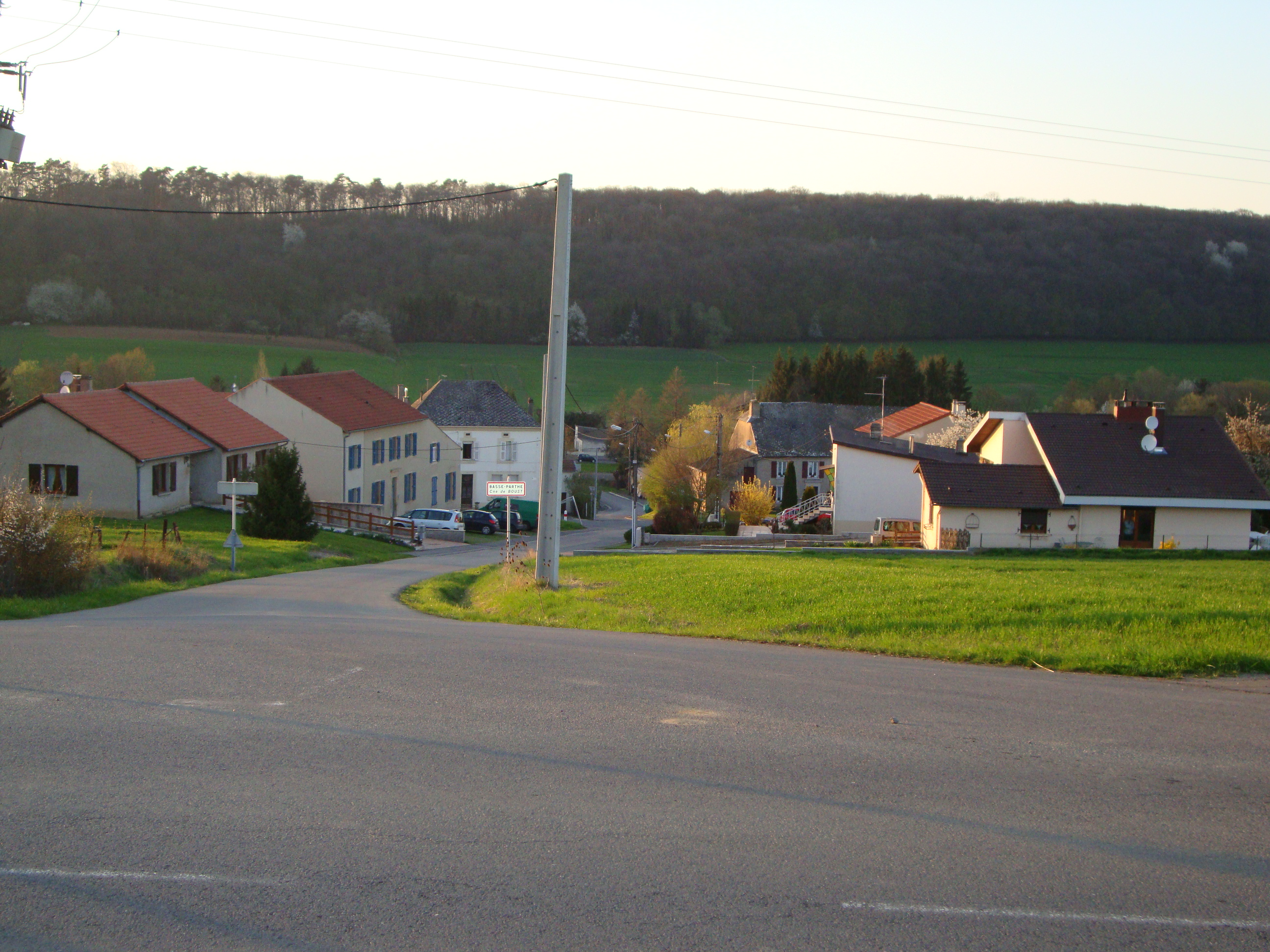 Basse-Parthe - Commune de Boust